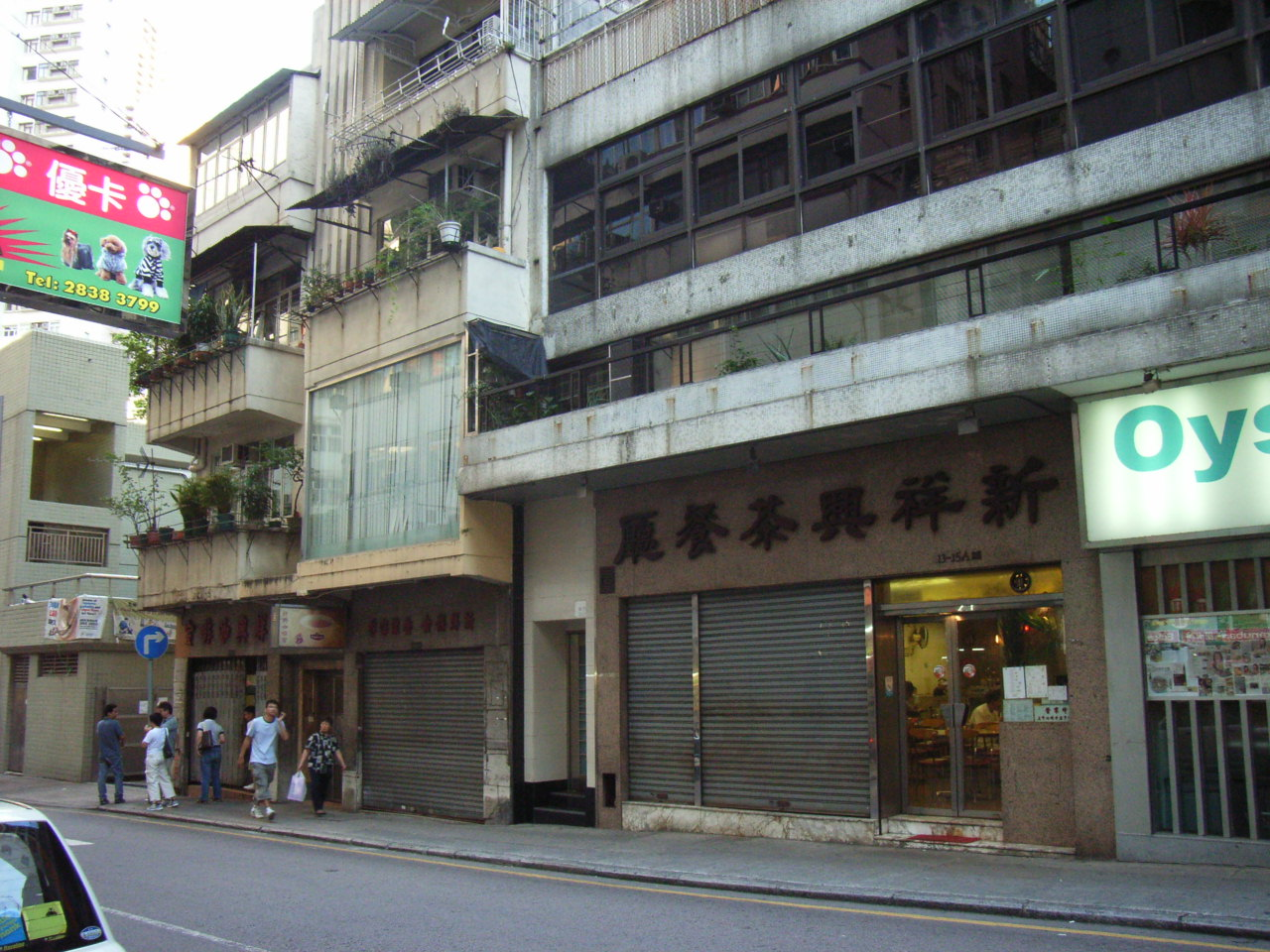 祥興咖啡室, 位於香港zh:跑馬地zh:奕蔭街9號 Author: BEVERLYSHEN